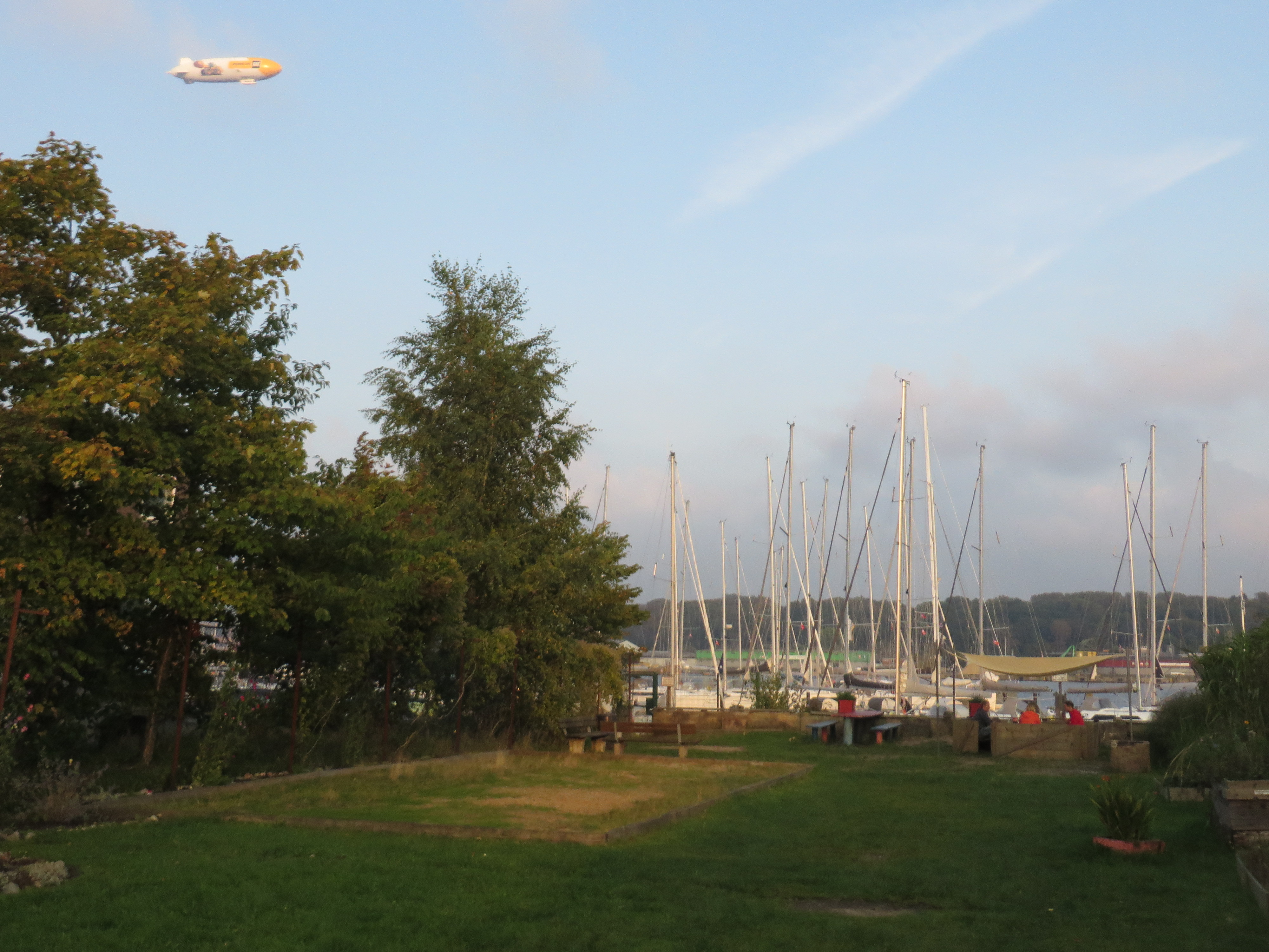 Zeppelin NT (Zeppelin CAT) von Flensburg-Schäferhaus kommend bei Galwik, 2017, Bild 03